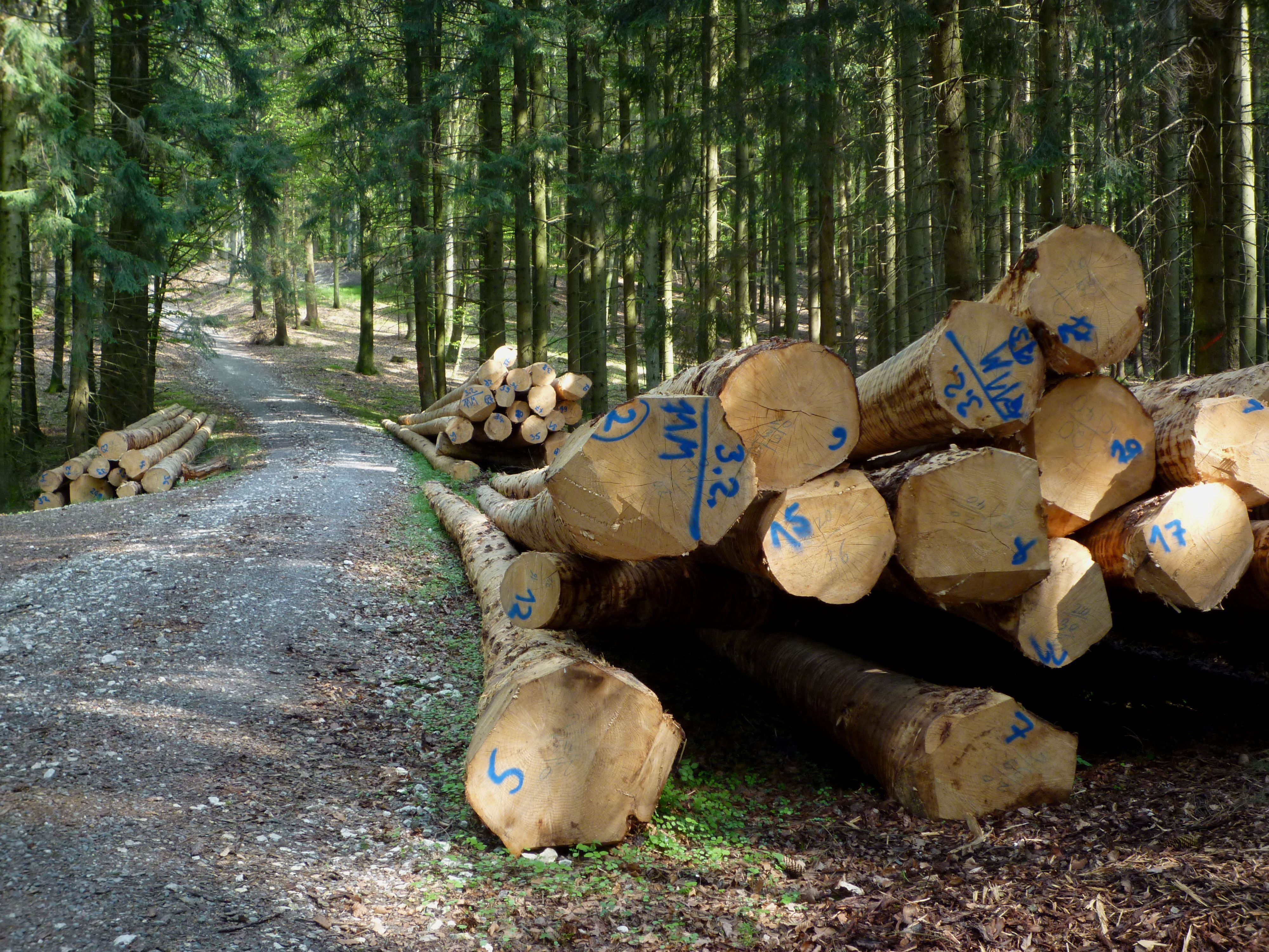 Weißenhorn - Fichtenstämme